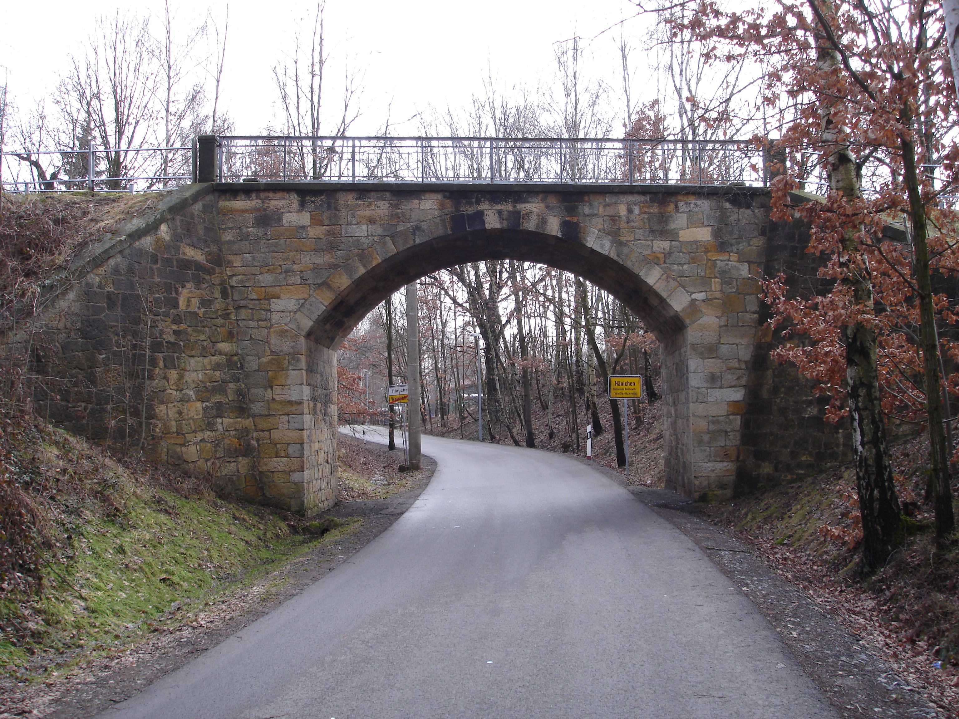 Straßenbrücke über die Trasse der Windbergbahn in Hänichen, Gemeinde Bannewitz